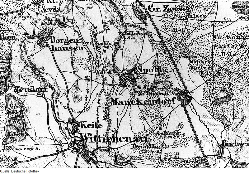 Original image description from the Deutsche Fotothek Wittichenau-Spohla. Topographische Karte vom Preußischen Staate, Bl. 250 Hoyerswerda, aufgen. 1846